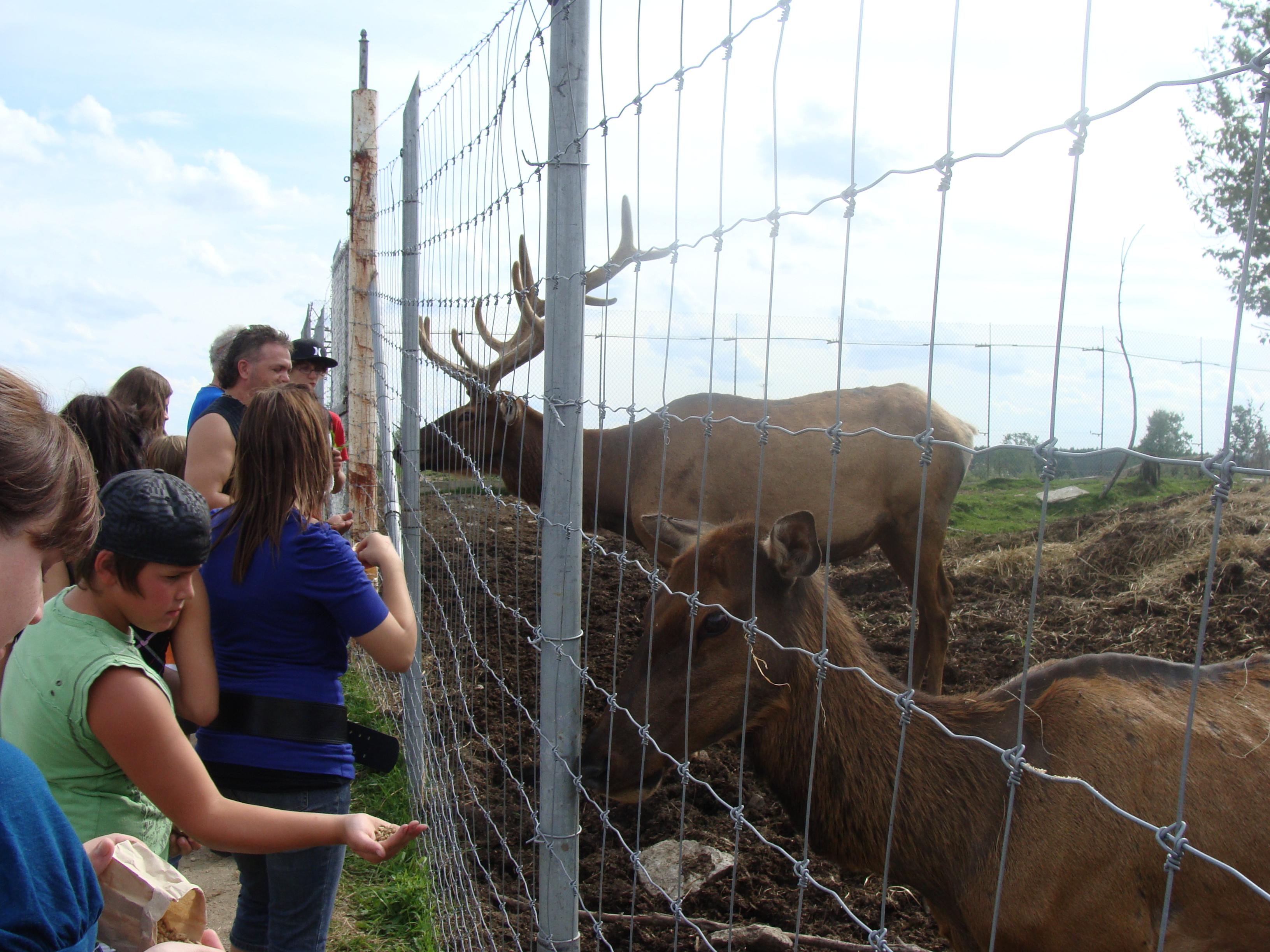 Wapitis nourris par des humains au Centre d'observation de la faune de Falardeau (COFF) au Québec.